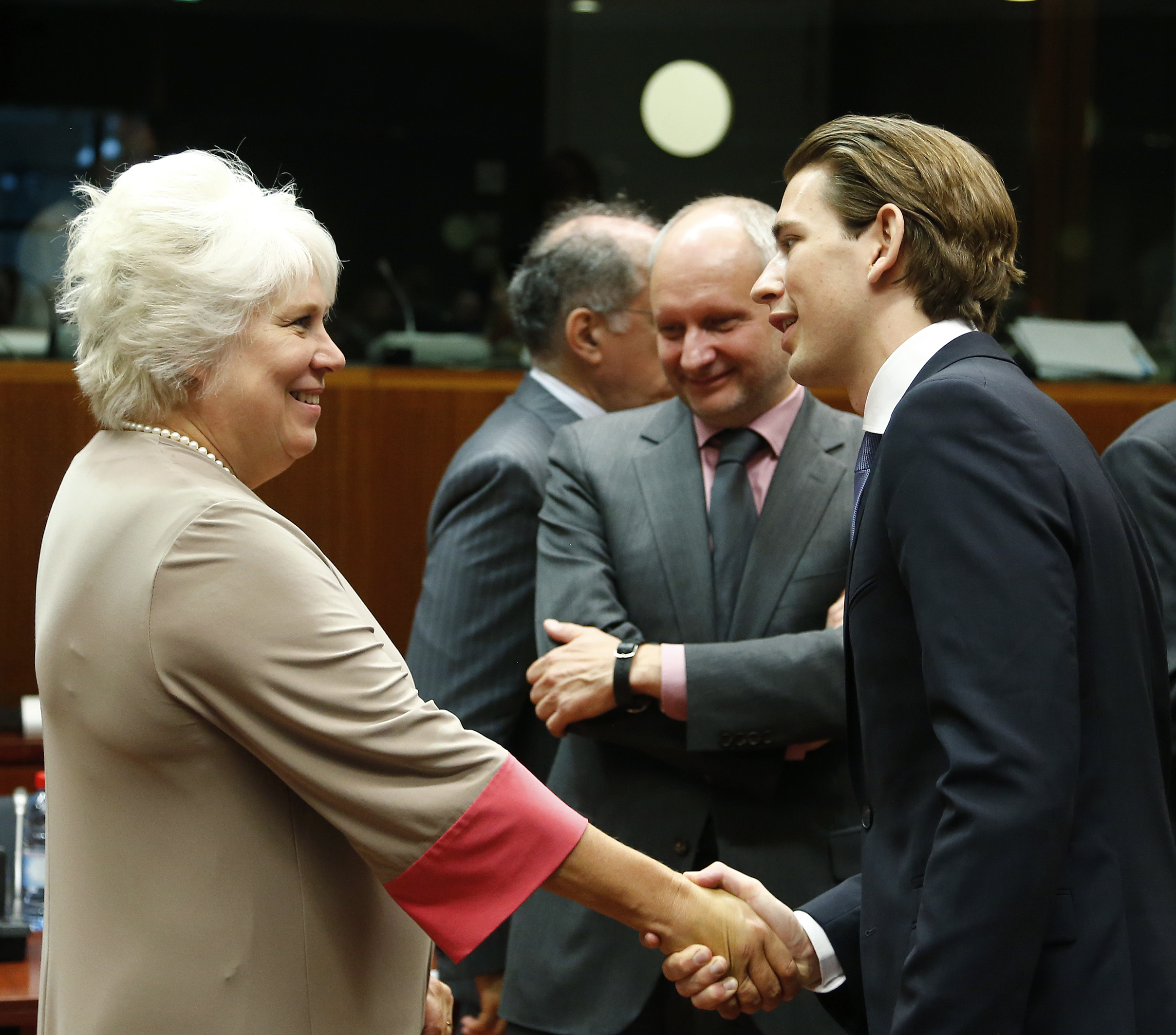 Rat Auswärtige Angelegenheiten. Bundesminister Sebastian Kurz mit der estnischen Außenministerin Marina Kaljurand. Brüssel, 20.07.2015, Foto: Dragan Tatic